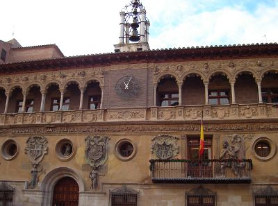 Ayuntamiento de Tarazona, Tarazona city council